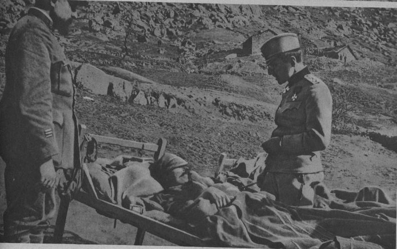 extrait du journal "le miroir".